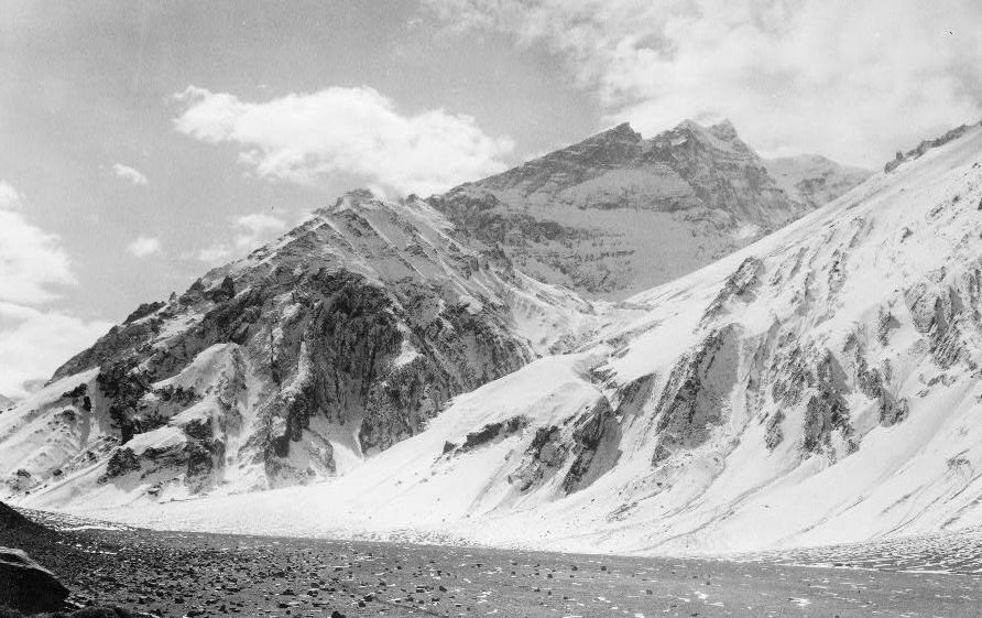 Mt. Aconcagua, Argentina